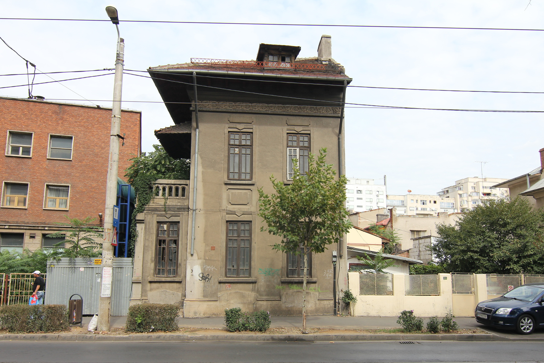 Casă pe Dudești